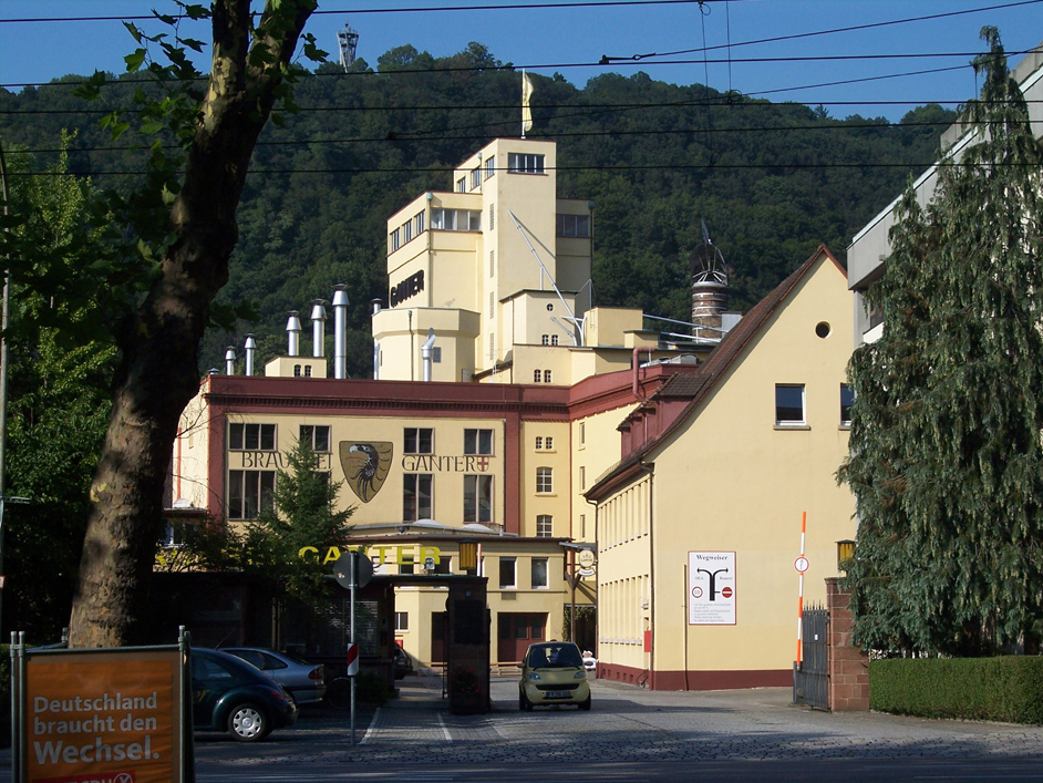 Eingangstor der Brauerei Ganter, Freiburg im Breisgau